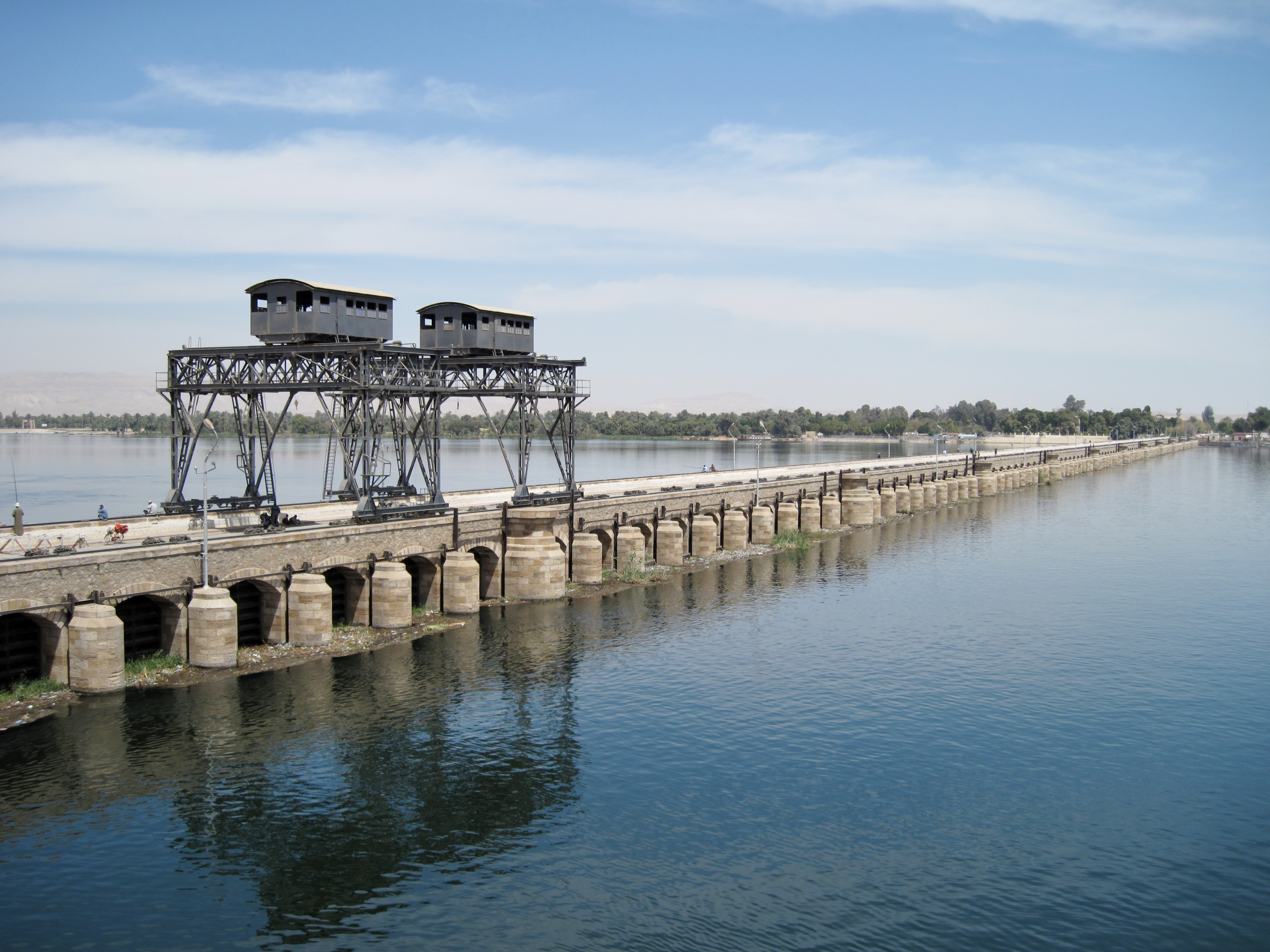 Nördliche Nilbrücke in Esna, Ägypten